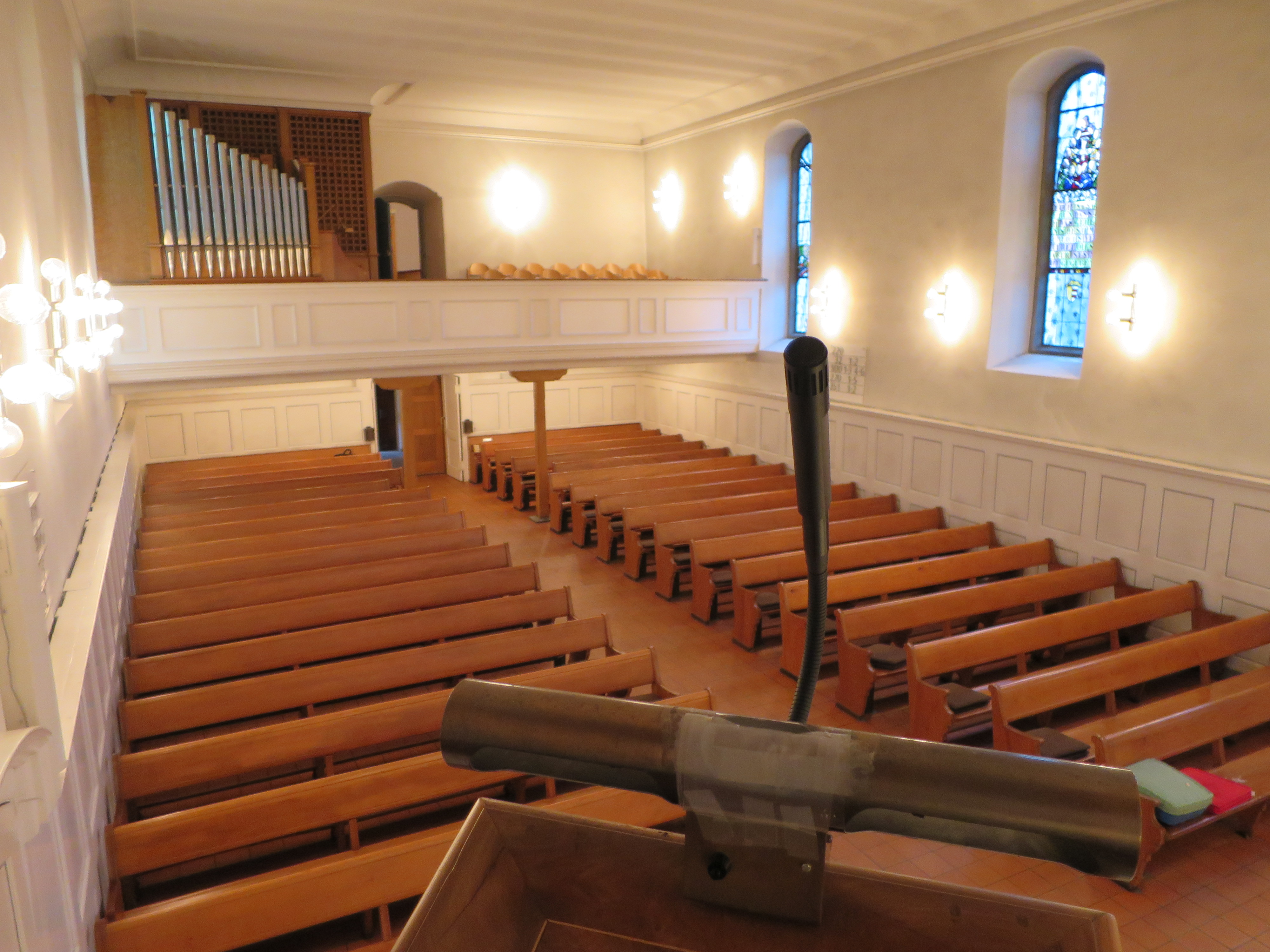 Blick von der Kanzel richtung Empore